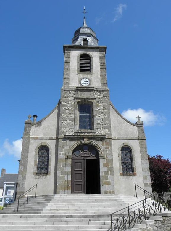 Façade principale de l'église Saint-Colomban de Saint-Coulomb (35).